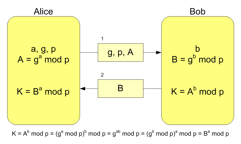 Diffie-Hellmann-Schlüsselaustausch